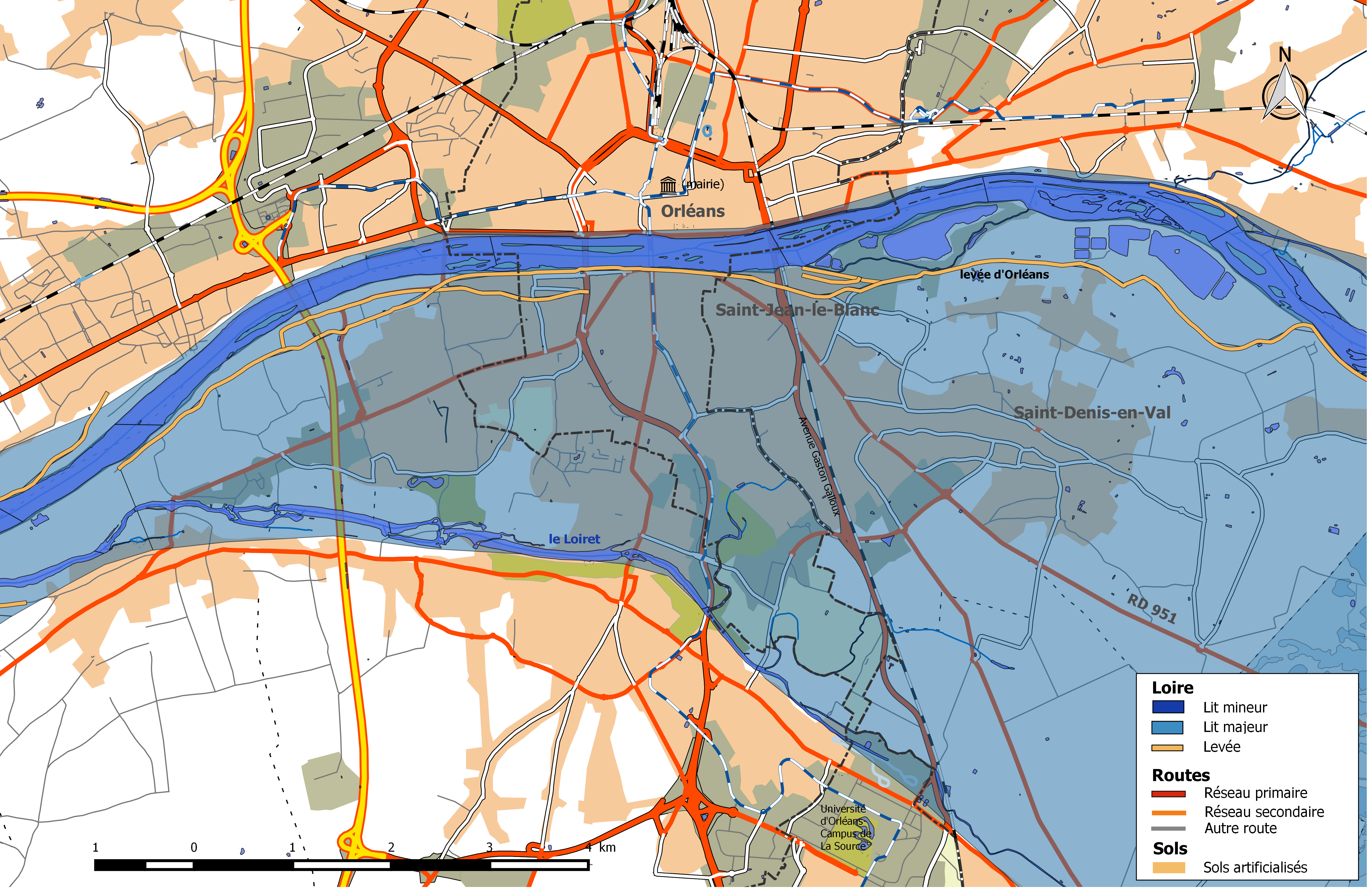 Zone inondable et réseaux hydrographique et routier de la commune d'Orléans.